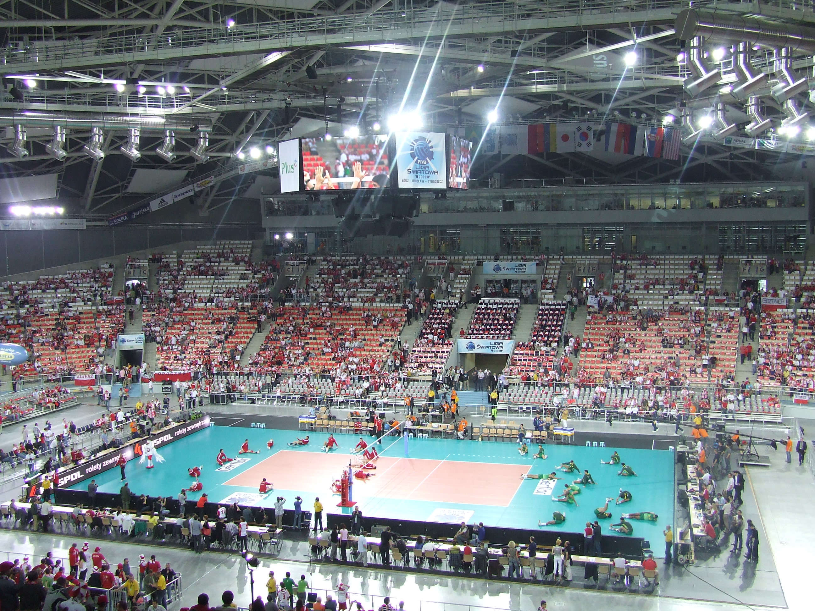 Pierwszy mecz w Arenie Łódź (Liga Światowa siatkarzy, Polska-Brazylia, 27 czerwca 2009).